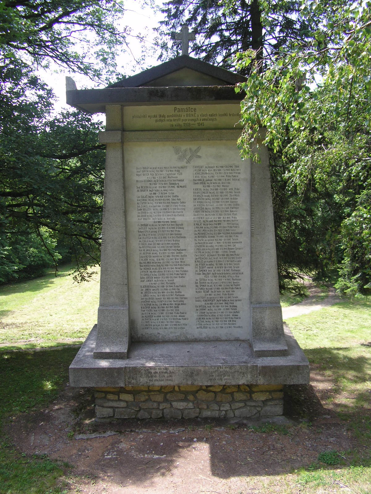 Památník lesníků u Adamova